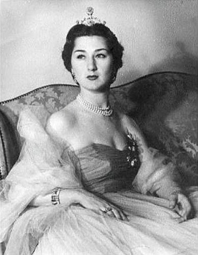 الملكة فاطمة فاطمة نسل شاه